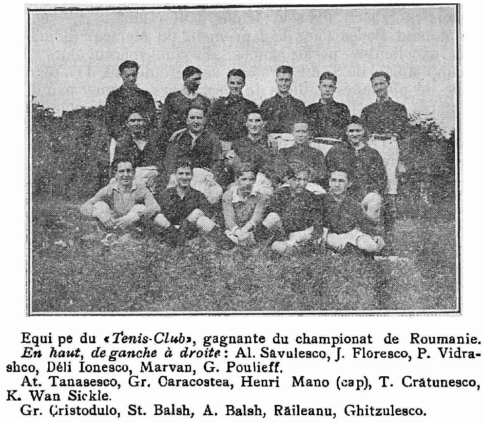 echipa de rugby "Tenis Club" din Bucureşti, România, campioană a României în 1922